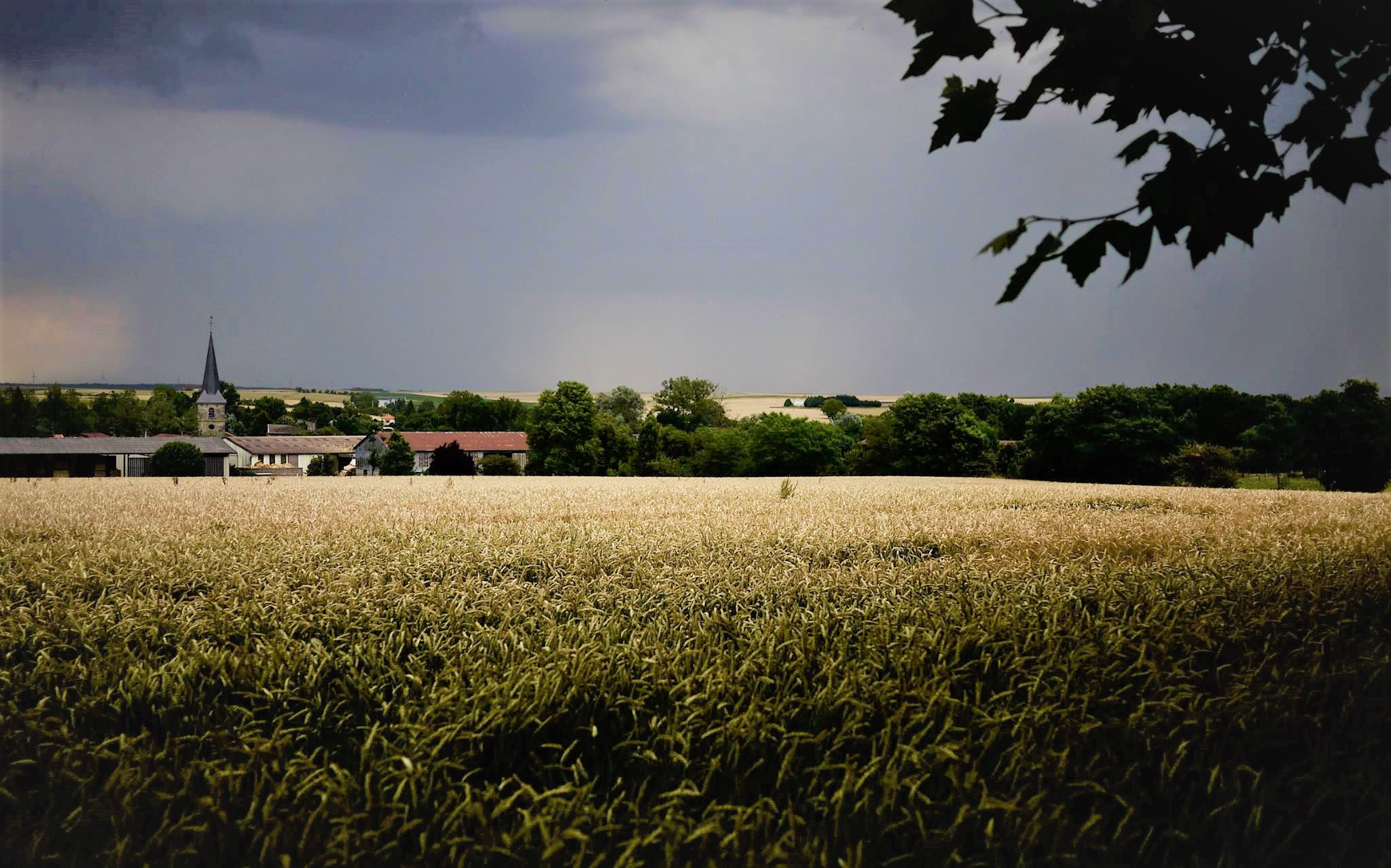 Lavoye